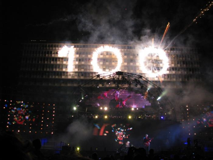 אירוע פתיחת חגיגות המאה לתל אביב